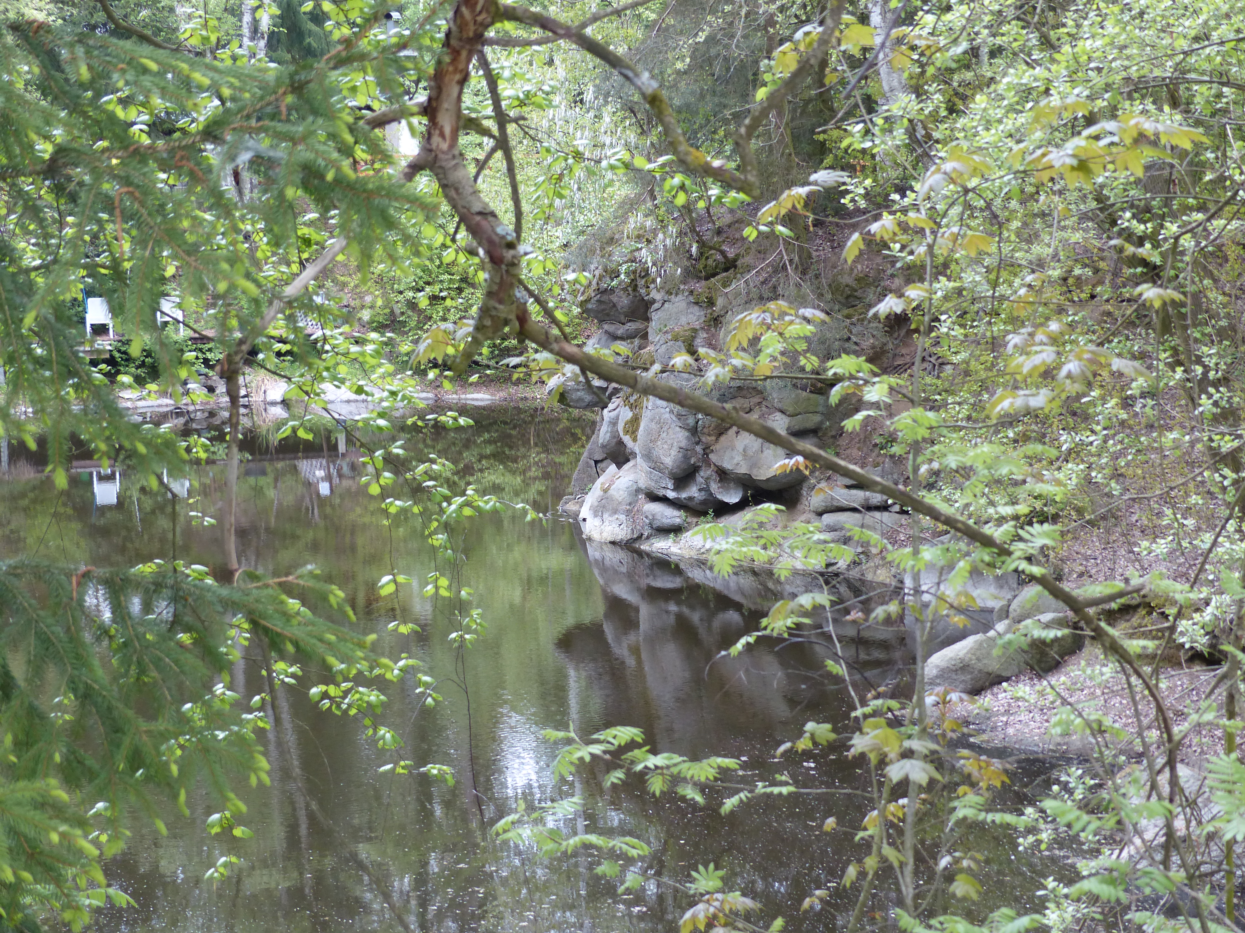 Ehemaliger Redwitzitbruch Grafenstein NE von Rathaushütte